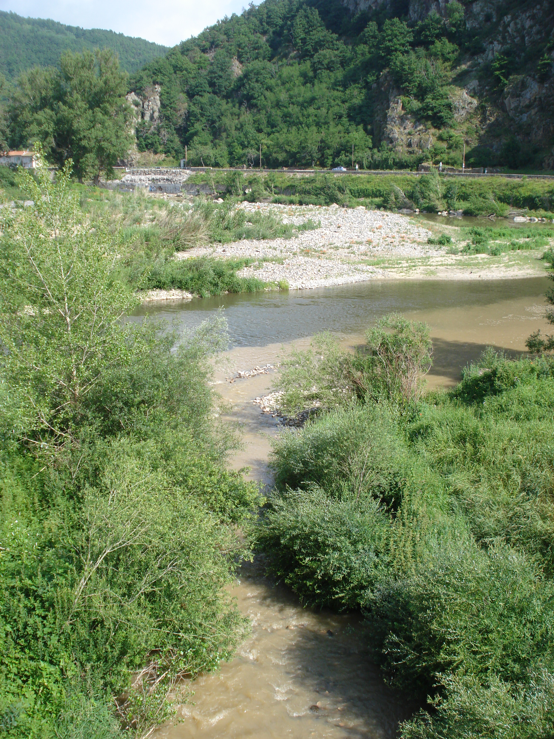 La Sumène (rivière, Haute-Loire) débouchant à Peyredeyre dans la Loire. Remarquez la difference de couleur des eaux se mélangeant